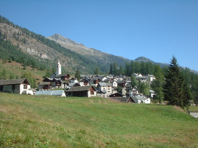 Bosco/Gurin von Westen